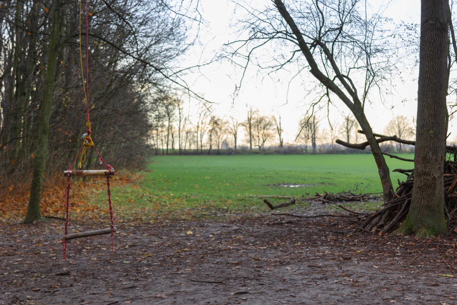 Hospodářské pole vedle PP Bažantnice v Satalicích